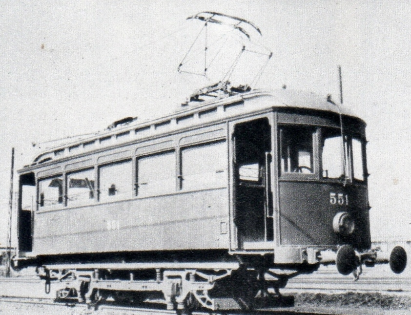 デシ551